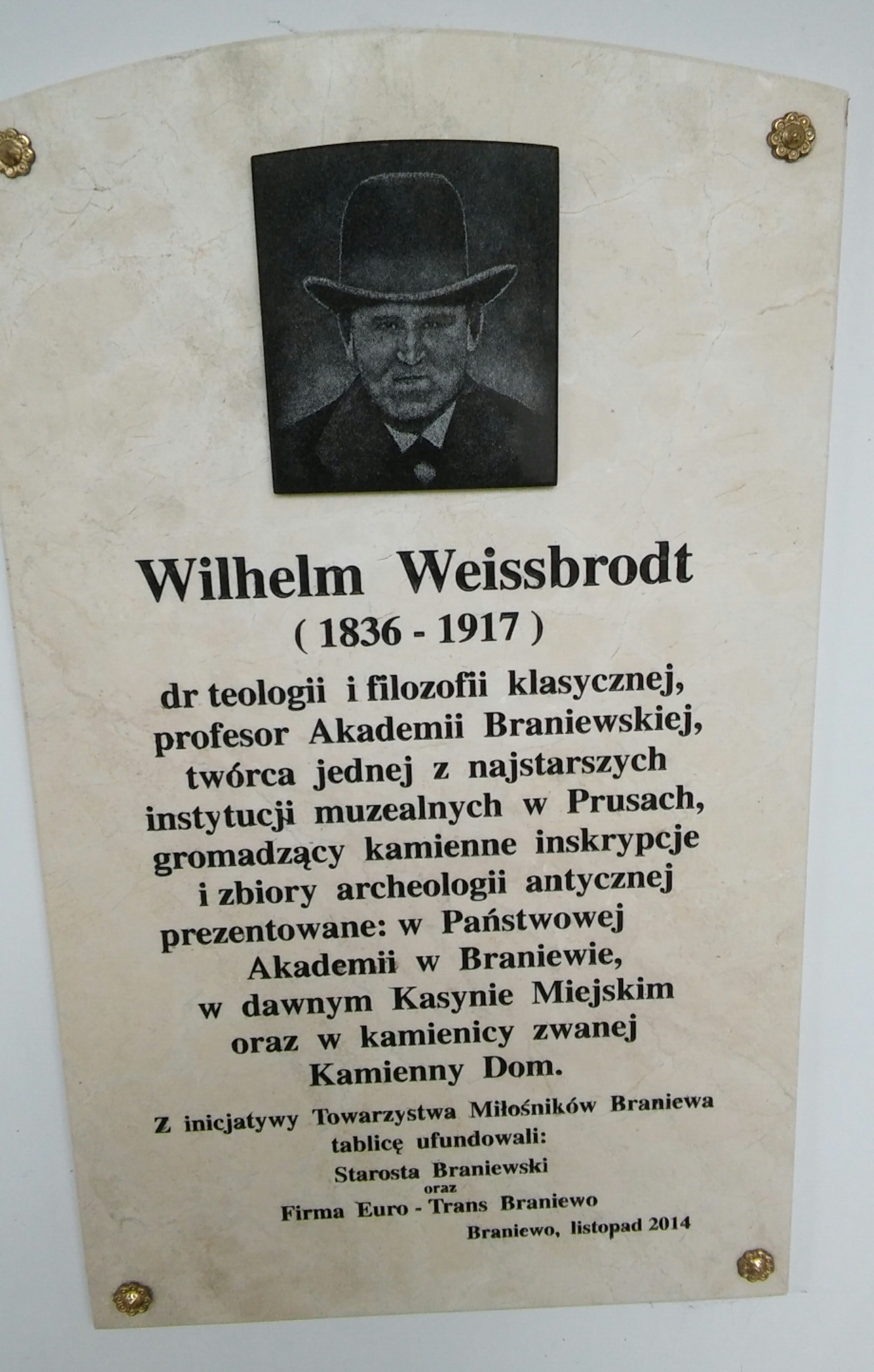 Wilhelm Weißbrodt Weissbrodt